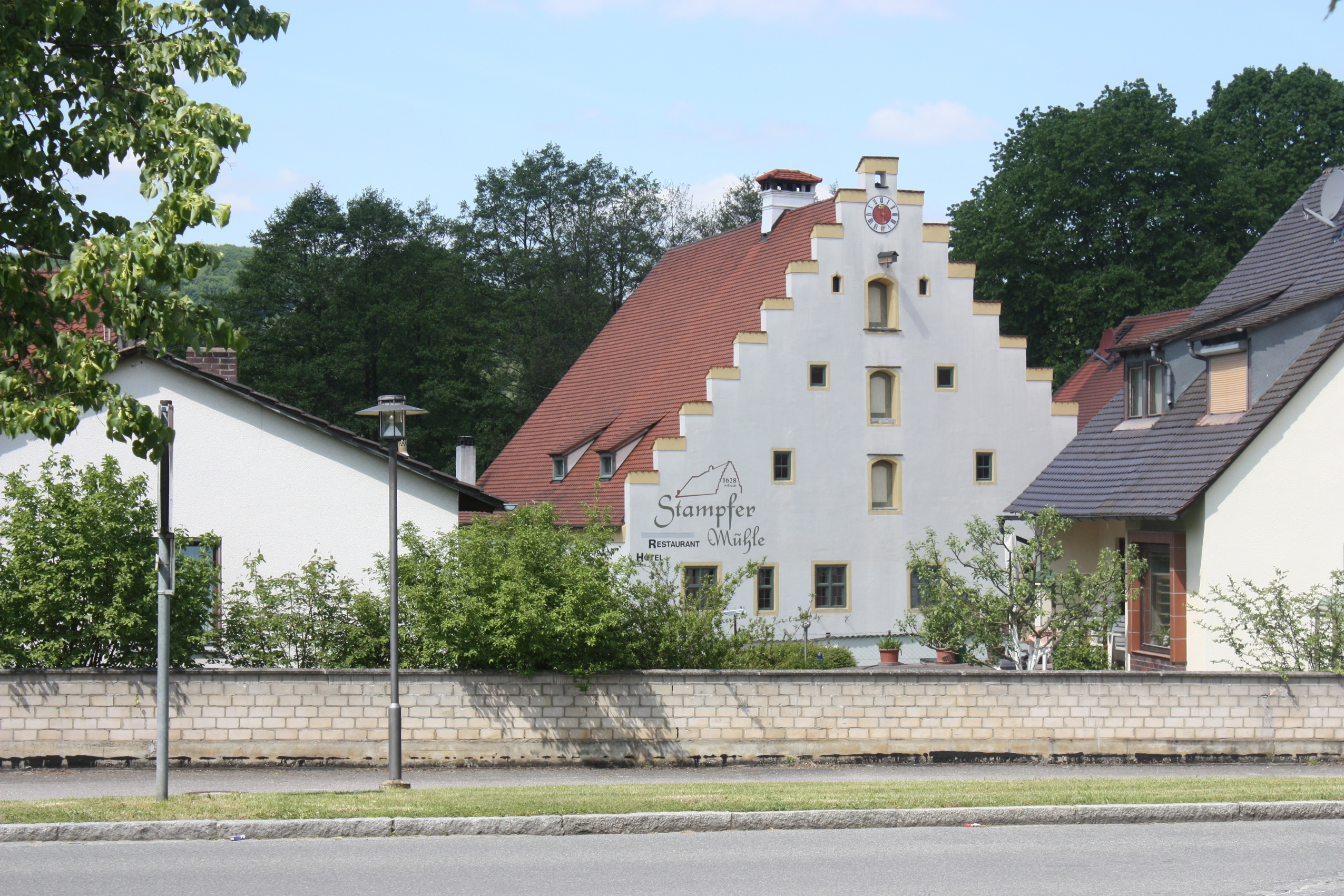 Berching, Stampfermühle This is a photograph of an architectural monument.